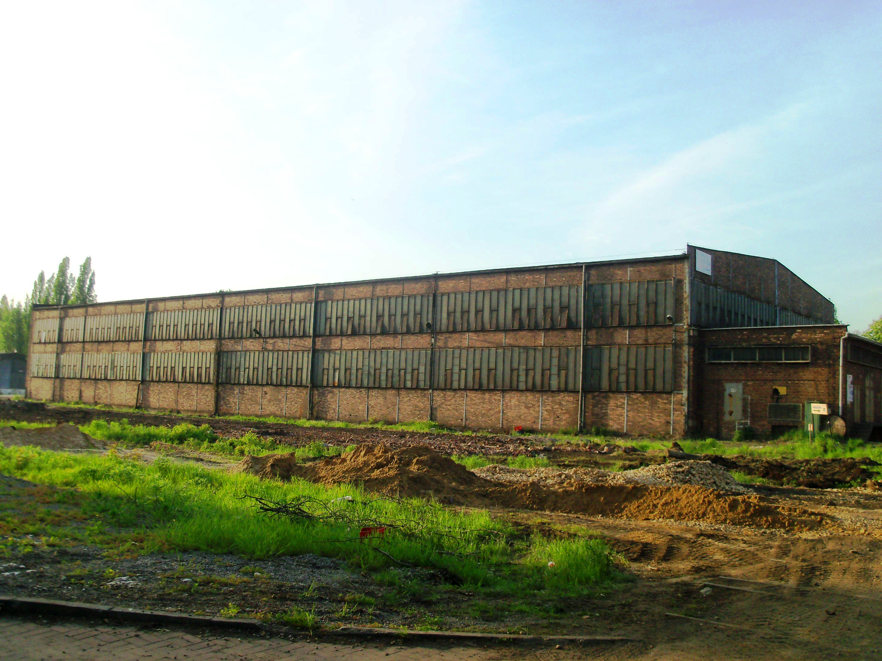 Huta Baildon w Katowicach